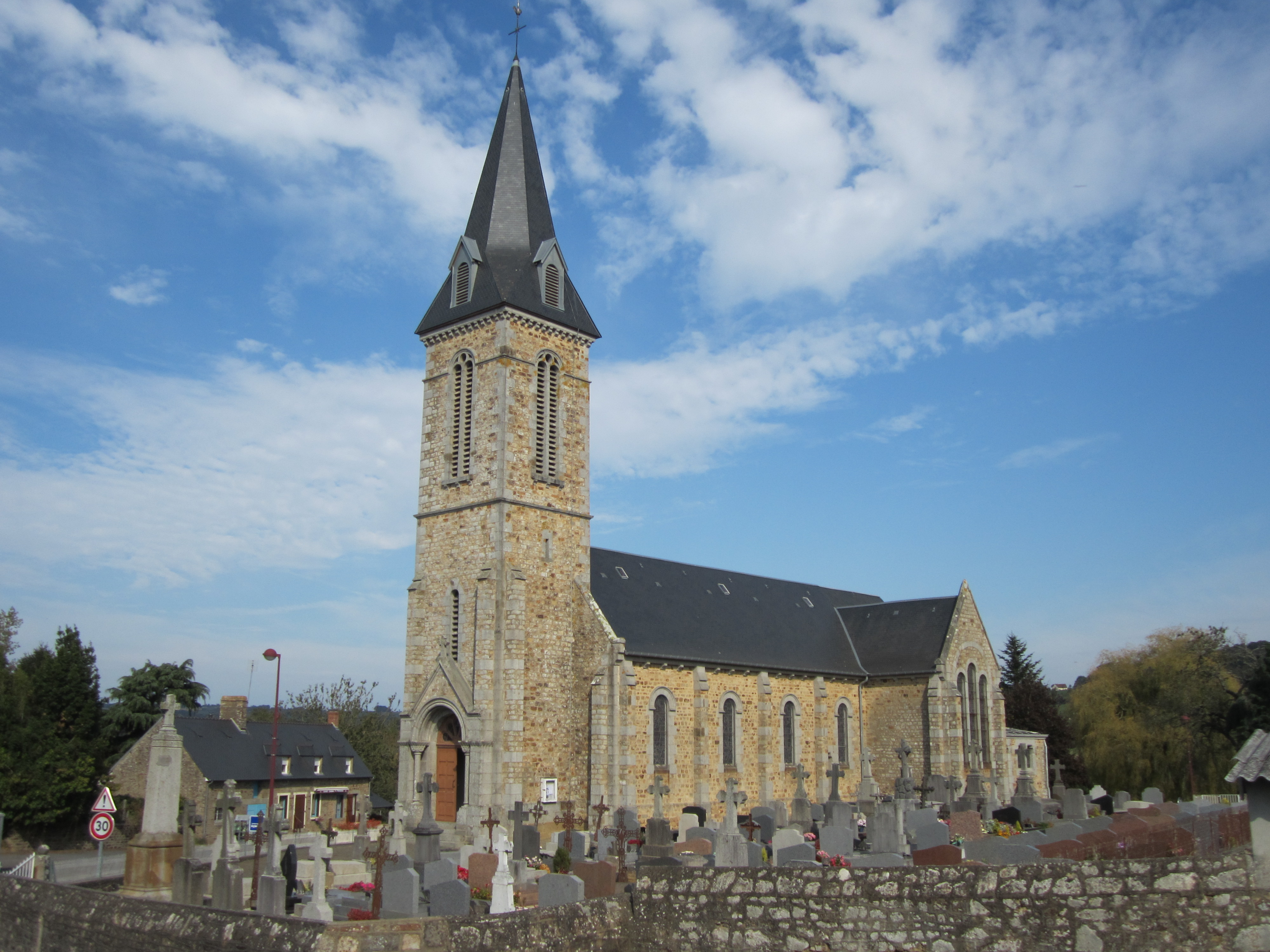 Les Chéris, Manche